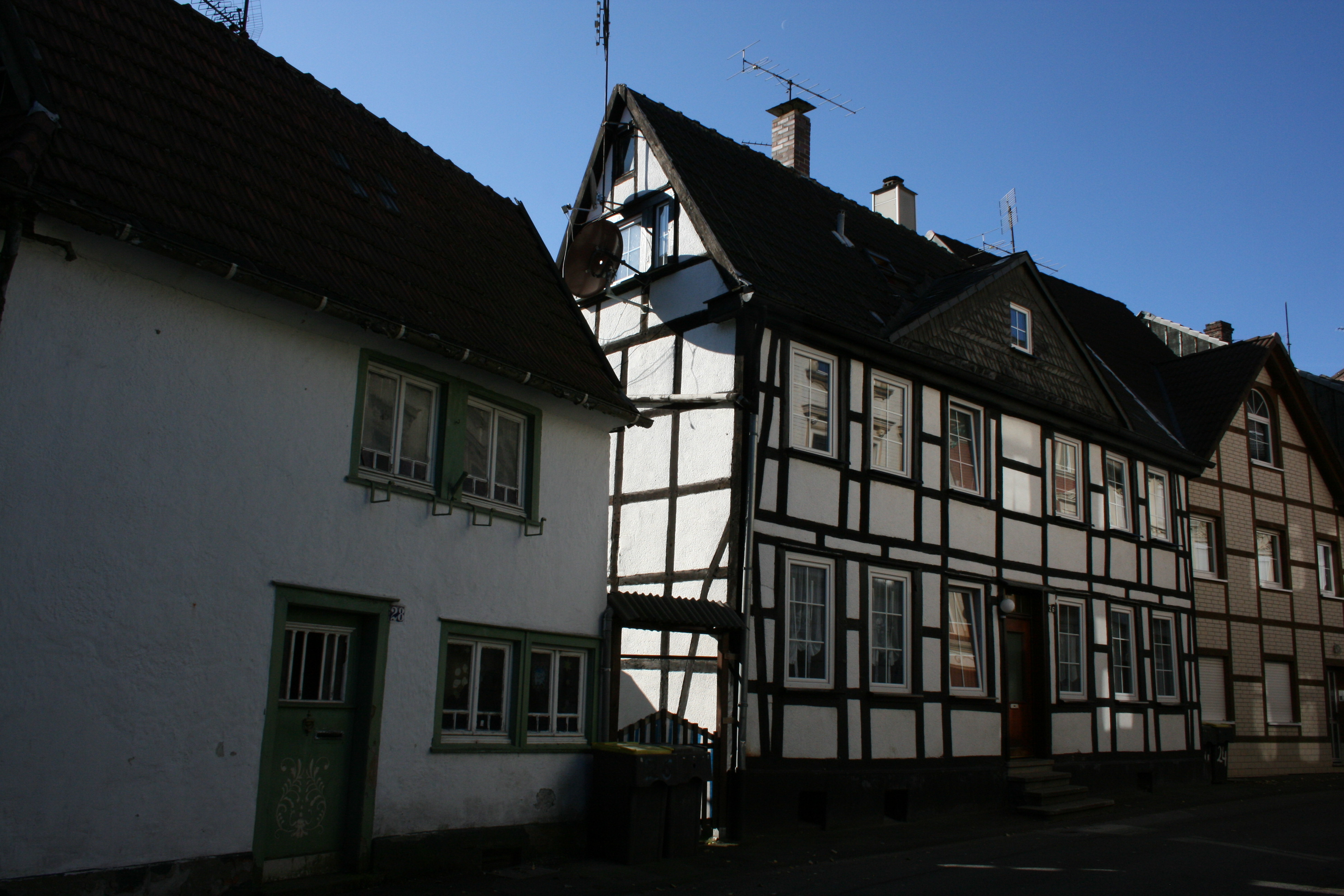 Zwei Baudenkmäler in Iserlohn, Südengraben 28 und 26 (links und mittig). Das Gebäude rechts steht nicht unter Denkmalschutz.